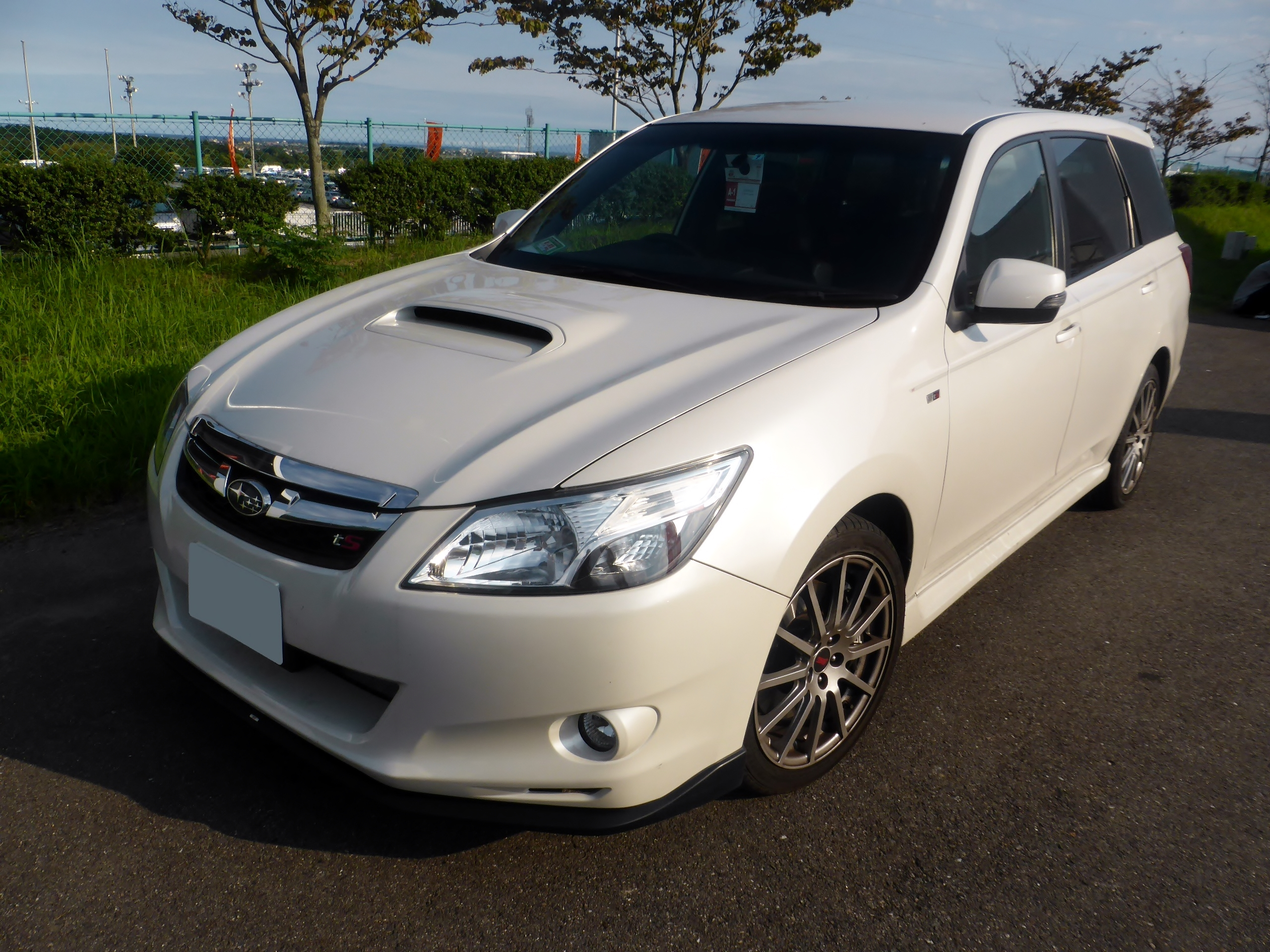 YA5型スバル・エクシーガtSをフロントから撮影。